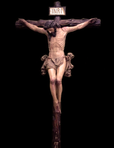 Santísimo Cristo de la Veracruz, de Sierra de Yeguas, Málaga.